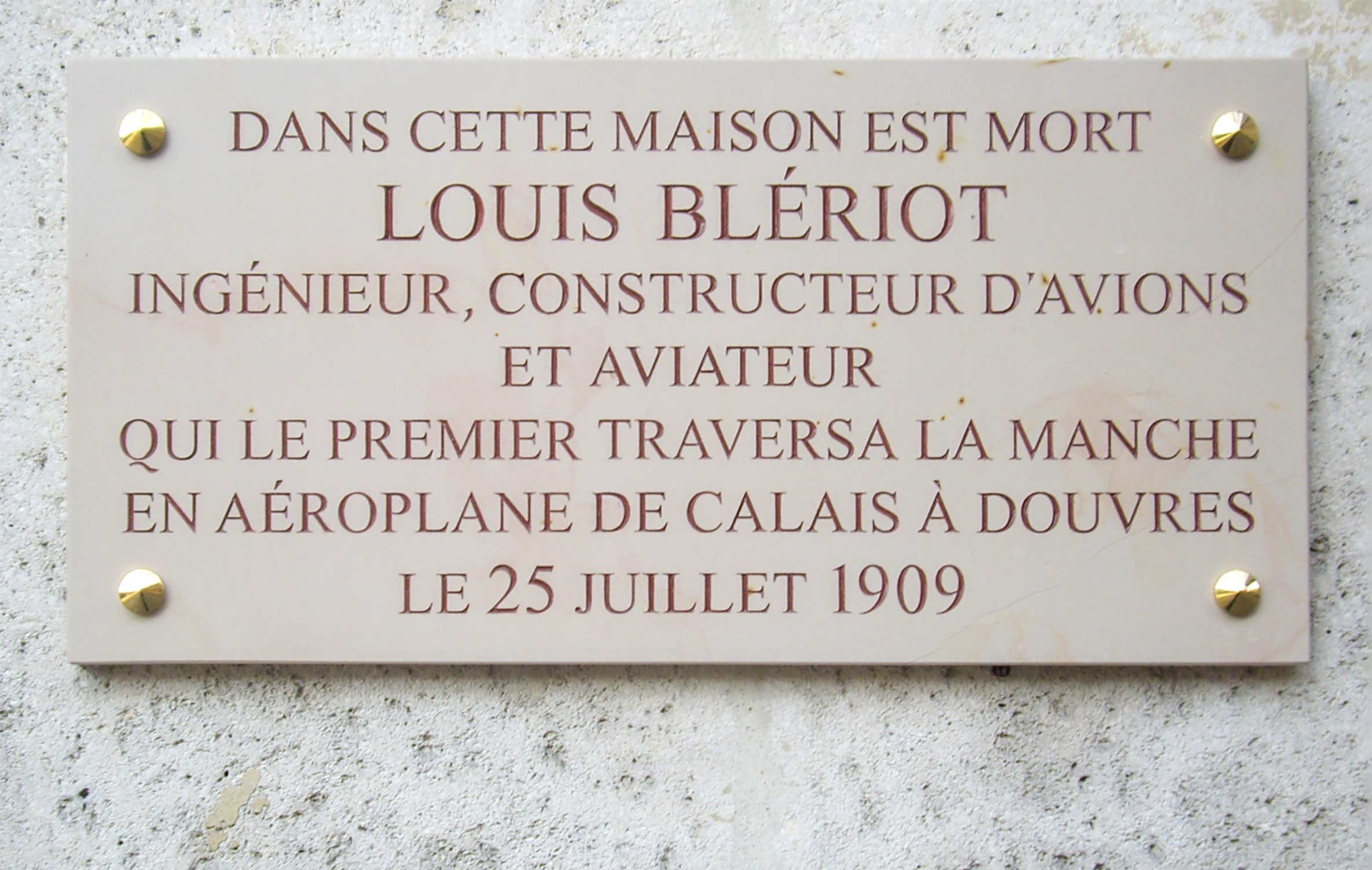 Plaque commémorative, 288 boulevard Saint-Germain, Paris 7e. « Dans cette maison est mort Louis Blériot, ingénieur, constructeur d'avions et aviateur, qui le premier traversa la Manche en aéroplane de Calais à Douvres le 25 juillet 1909. »